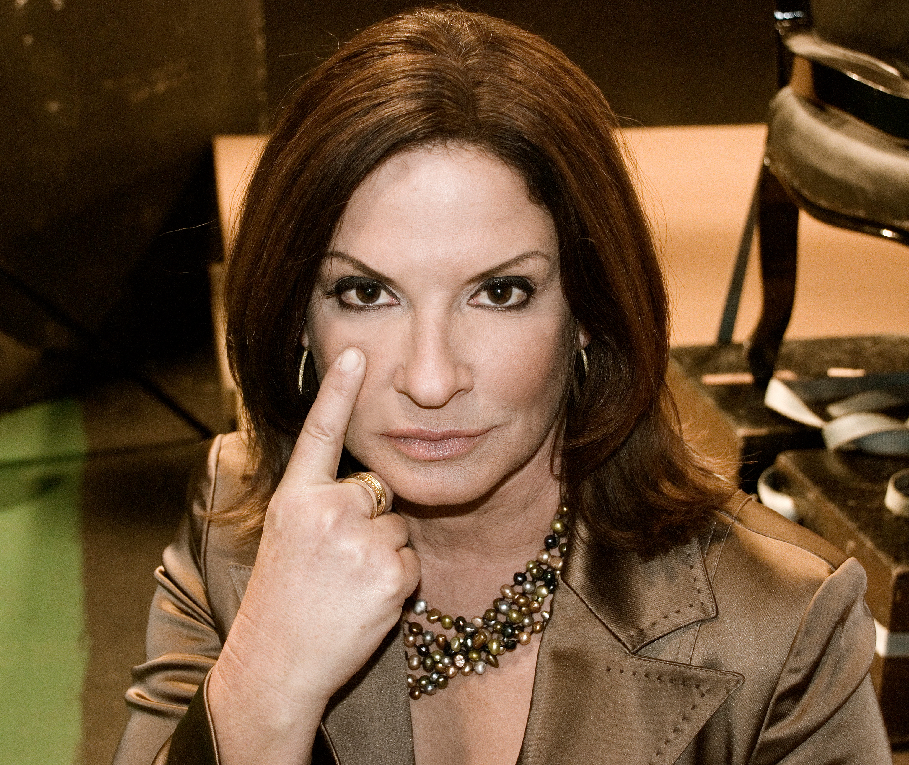 Ana María Polo, abogada y presentadora de televisión.